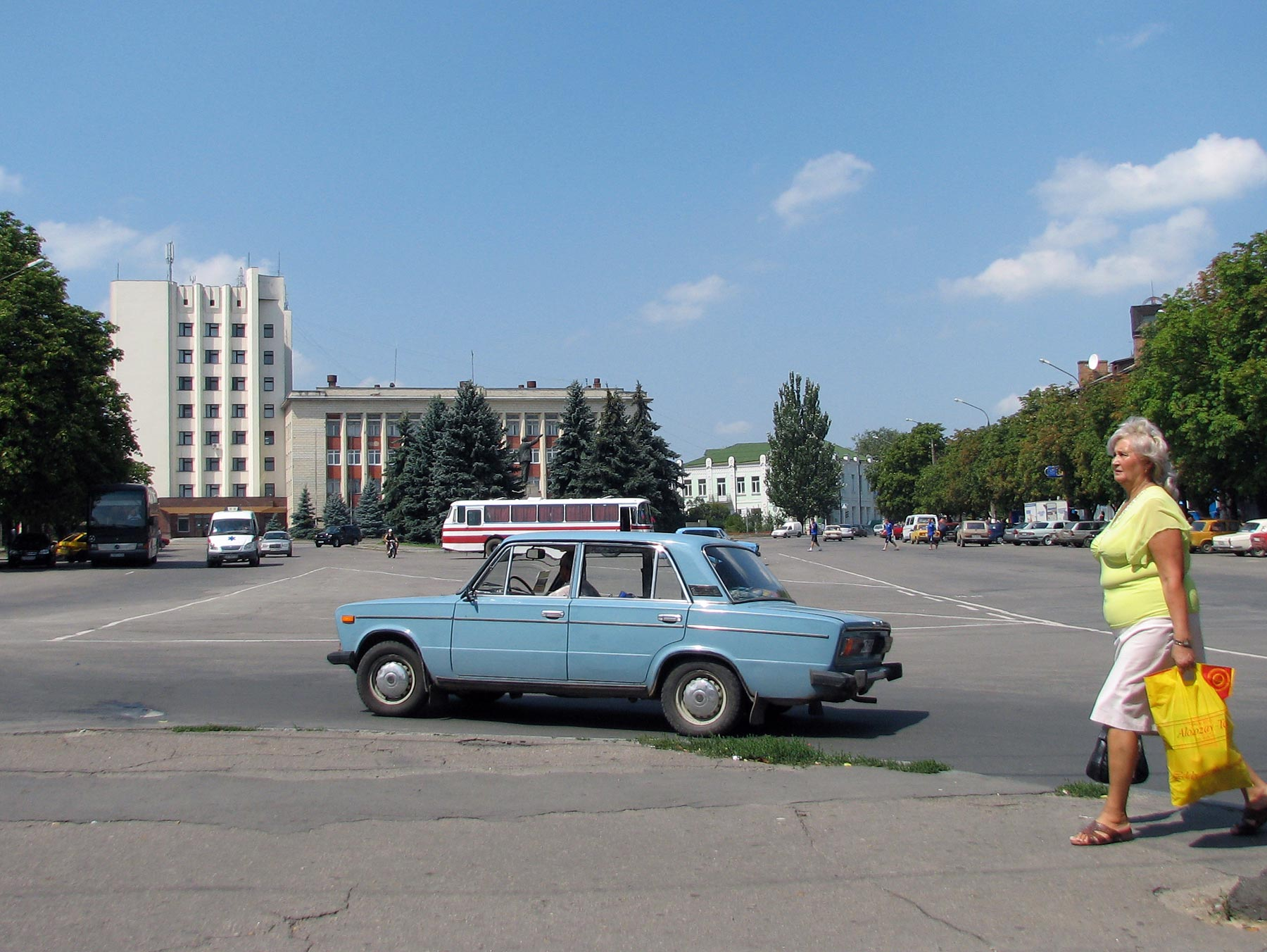 Lenin square in Uman, Ukraine